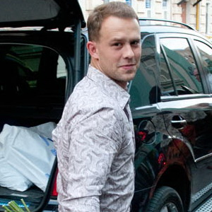 Кирилл Плетнёв на свадьбе актрисы Лянки Грыу и режиссера Михаила Вайнберга 9 июля 2010 года